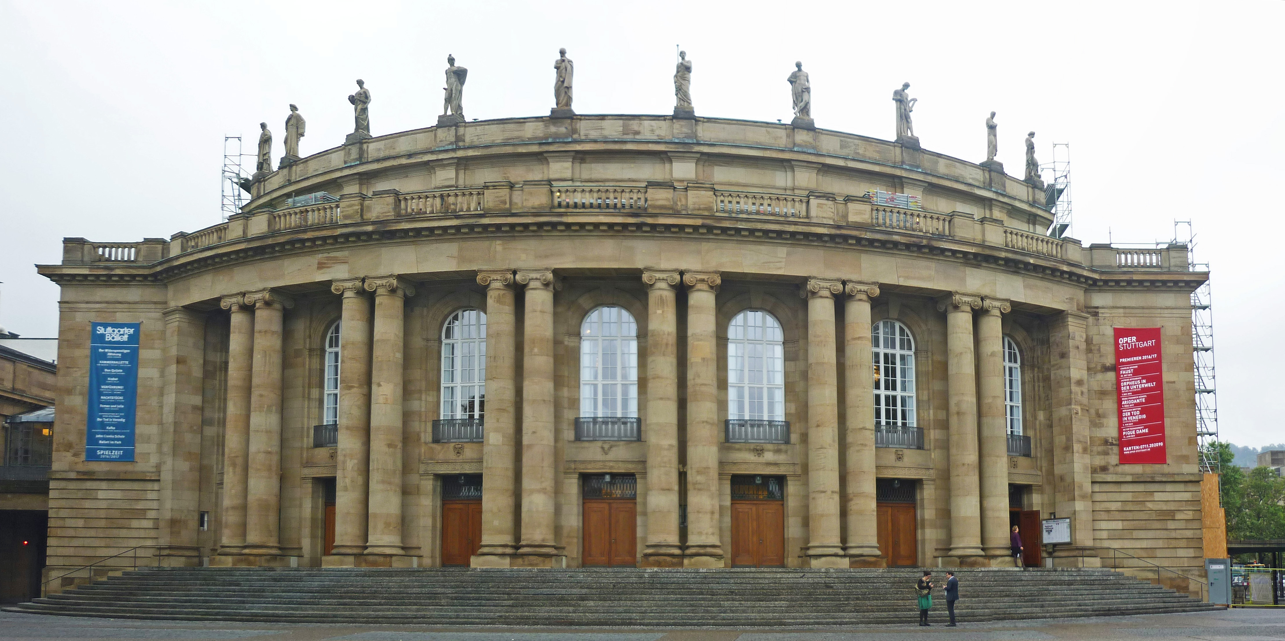 Staatstheater in Stuttgart (Opernhaus)